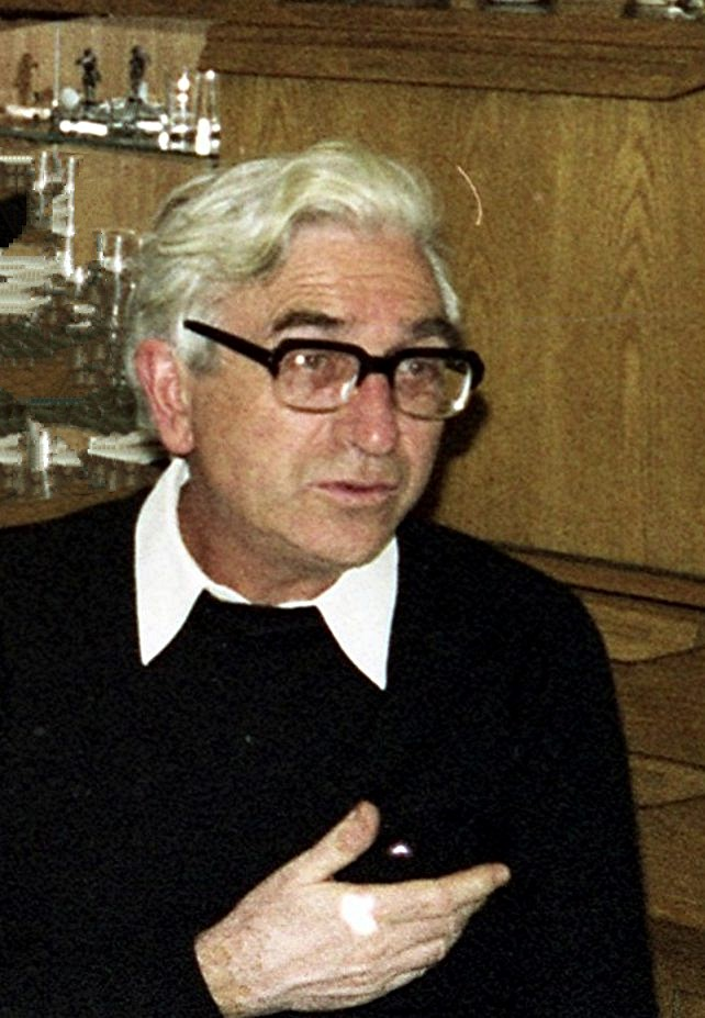 Pater Reinsberg v roce 1973